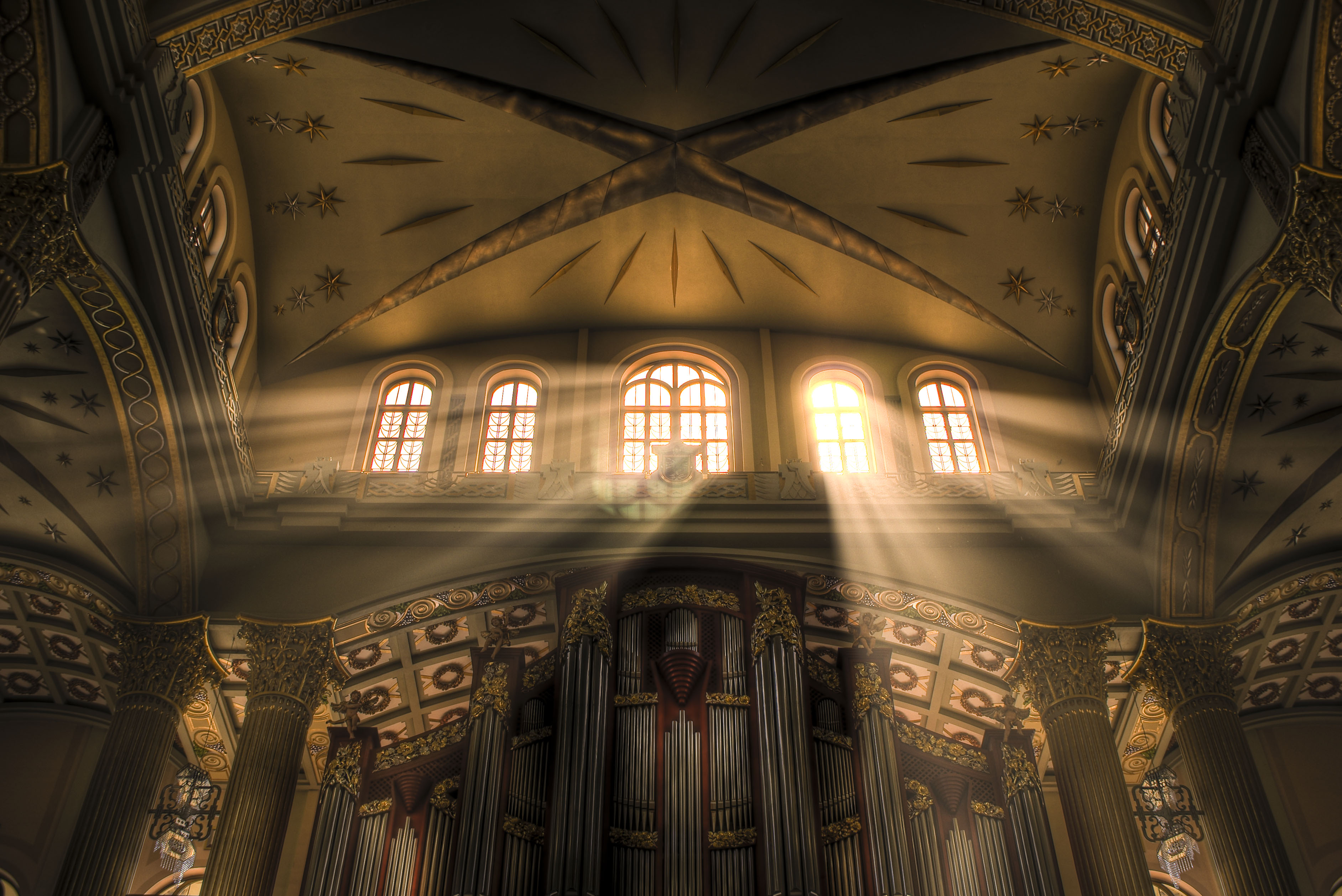 Wnętrze Bazyliki Matki Bożej Bolesnej Królowej Polski w Licheniu Starym